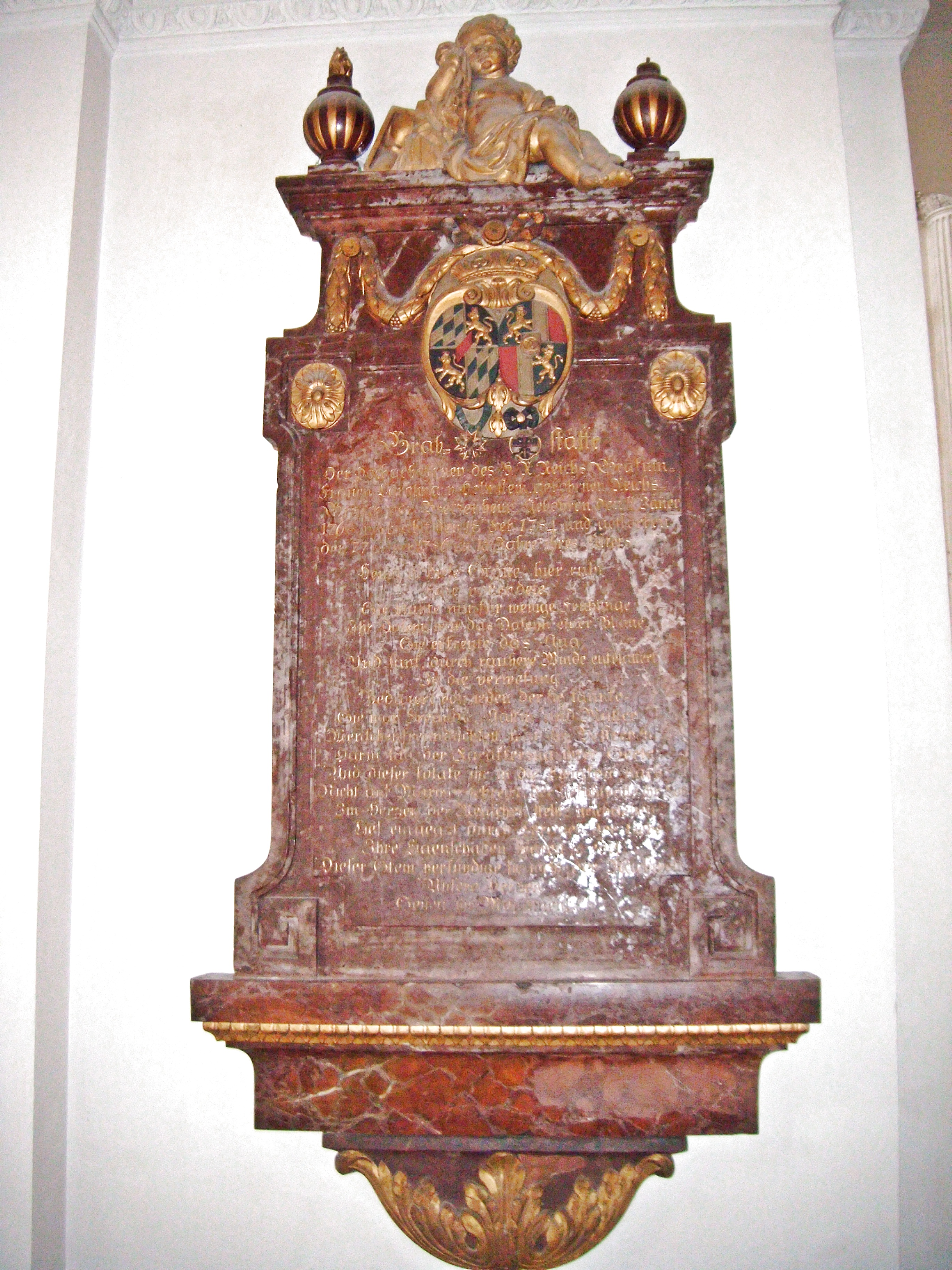 Karoline von Holnstein geb. von Bretzenheim (1768-1786), natürliche Tochter von Kurfürst Karl Theodor von Pfalz-Bayern, Epitaph, Theatinerkirche München